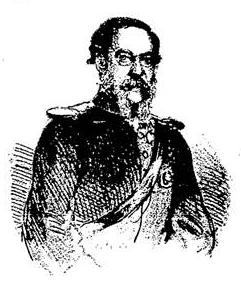 O valente tenente-coronel Emilio Luiz Mallet, commandante do 1º regimento d'artilharia a cavallo.